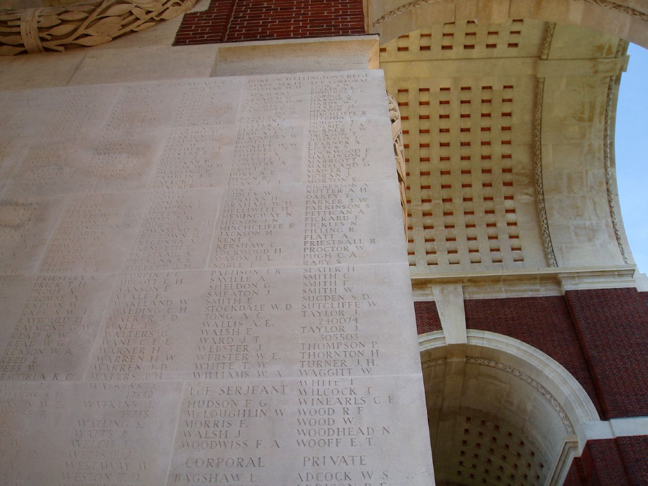 Thiepval (Somme, France) Détail du Mémorial.